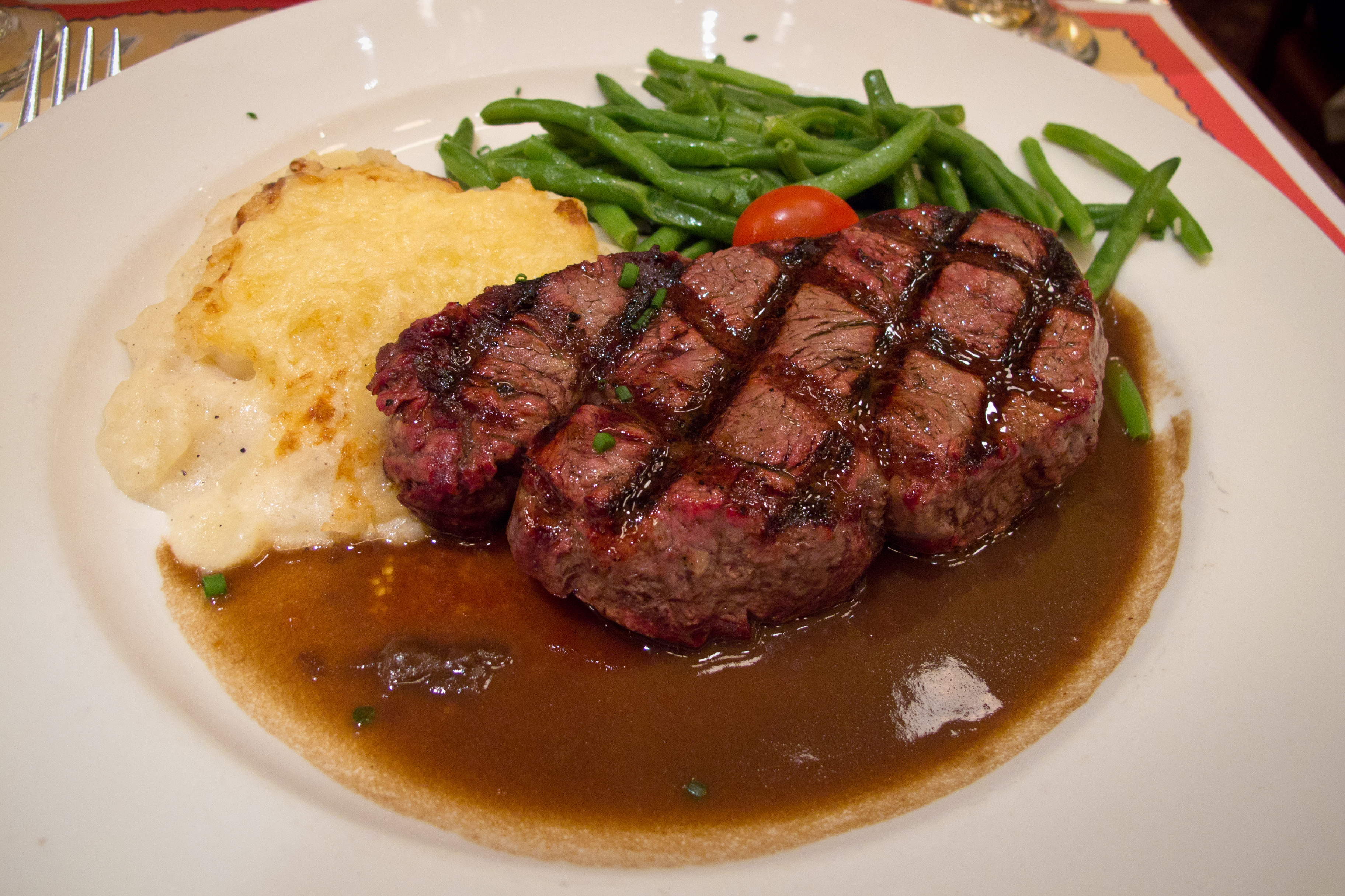 Filet de bœuf grillé